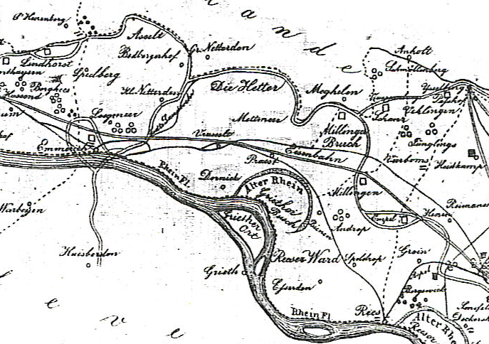 Schneider - Kreis Rees unter den Römern - detail: de Hetter